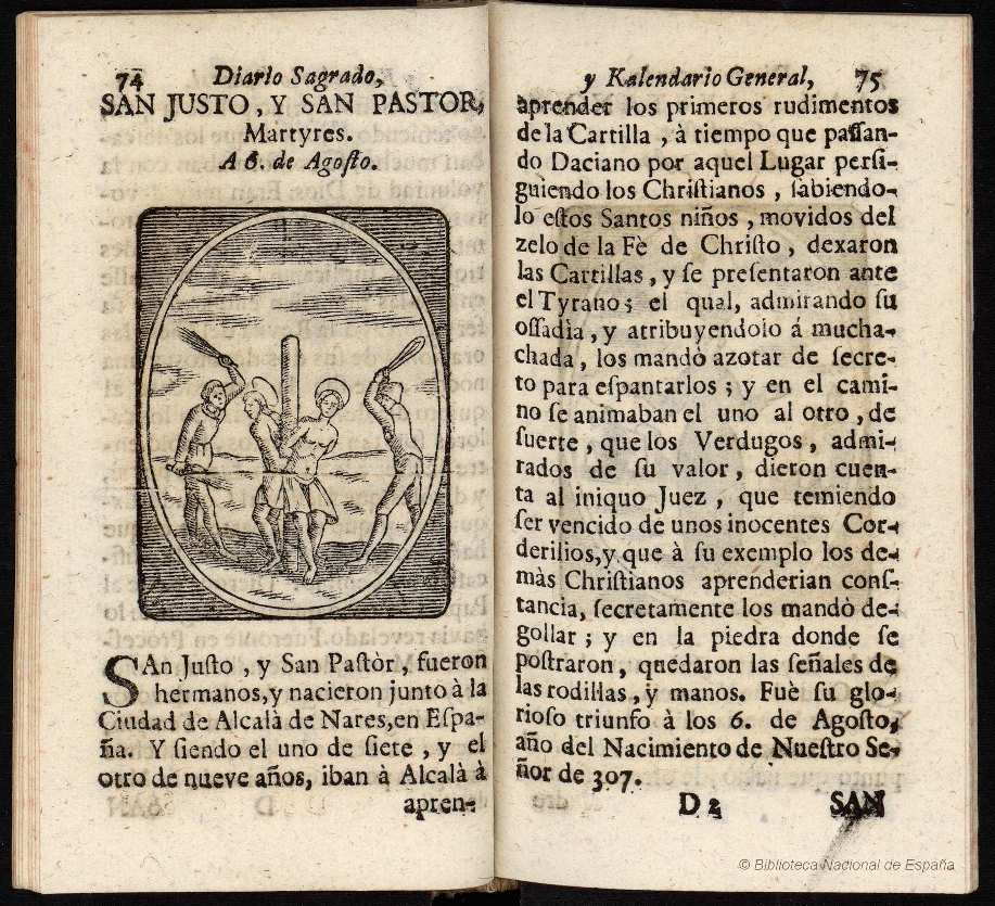 San Justo y San Pastor, mártires, Diario sagrado, y kalendario general para todo genero de personas... : Dividido en quatro partes... y compuesto por Pablo Minguet... Madrid, 1749